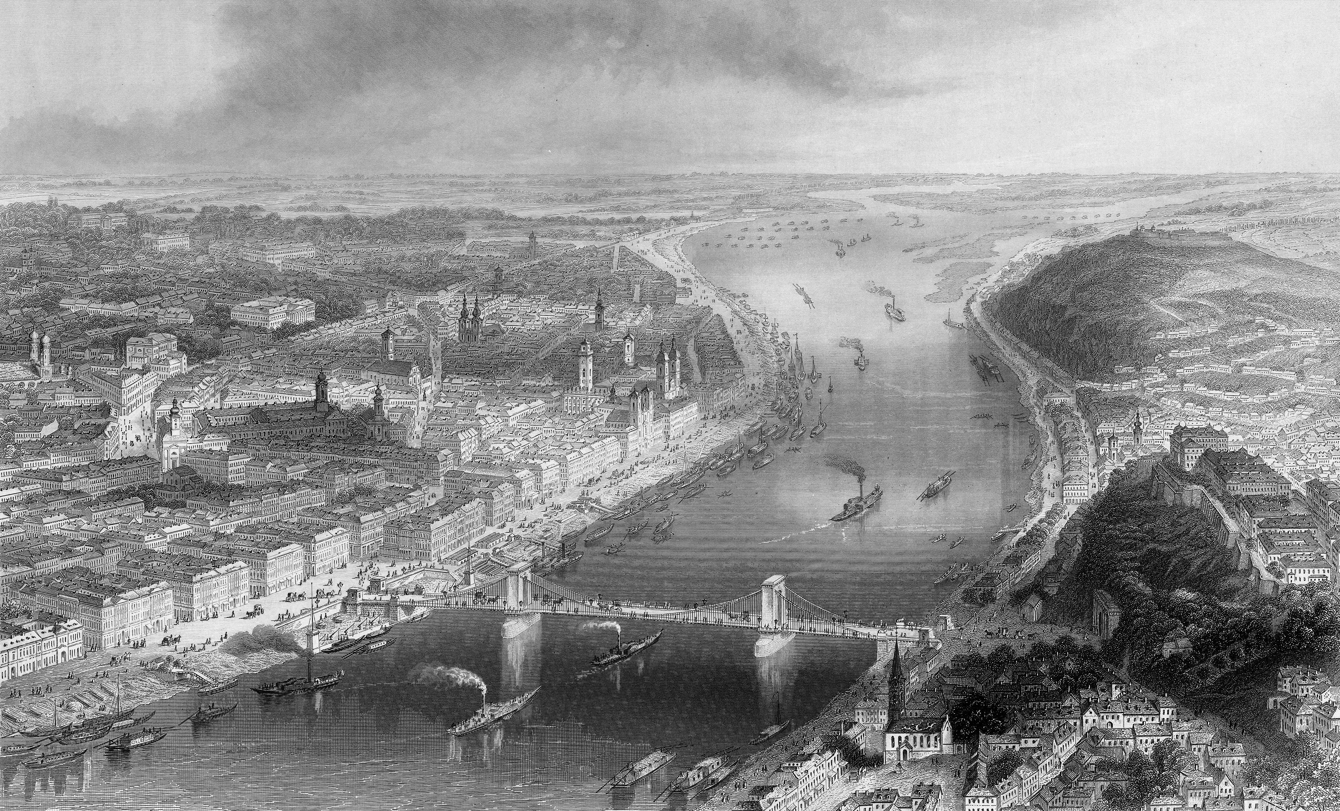 Pesth-Ofen aus: Central-Europa. Panoramische Ansichten der vorzüglichsten Haupt- und Residenzstädte, der wichtigsten See- und Handelsplätze, so wie der merkwürdigsten und interessantesten Gegenden Mittel-Europas, namentlich Deutschlands; nebst historisch-geographischen Text Englische Kunst-Anstalt von A. H. Payne, Leipzig und Dresden